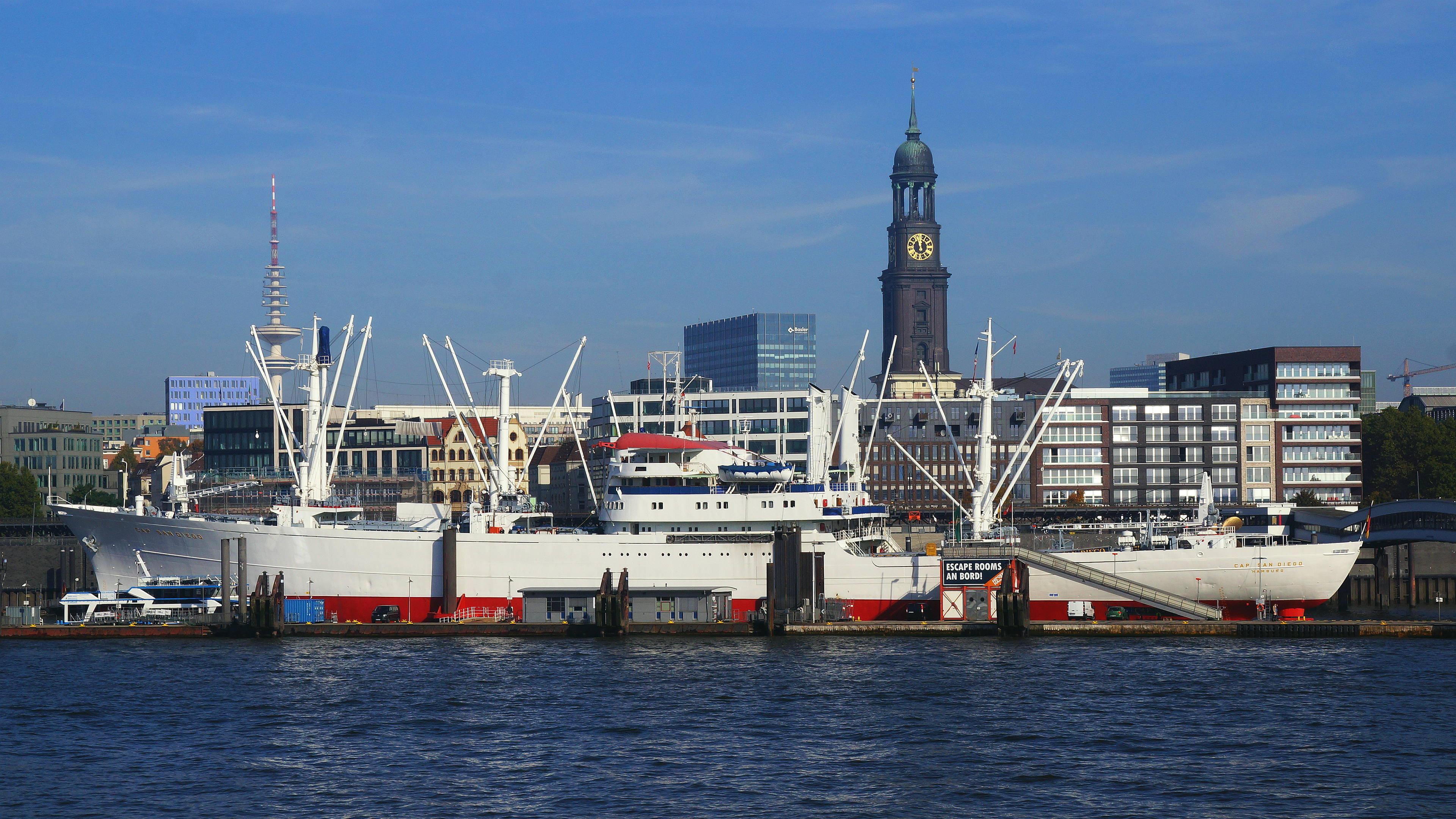 Museumsfrachtschiff Cap San Diego (1961): die ganze Breitseite des Schiffs (mit 159 m Länge) am Liegeplatz Norderelbe (Überseebrücke) nahe St. Pauli-Landungsbrücken Hamburg Germany - Foto Wolfgang Pehlemann DSC02843